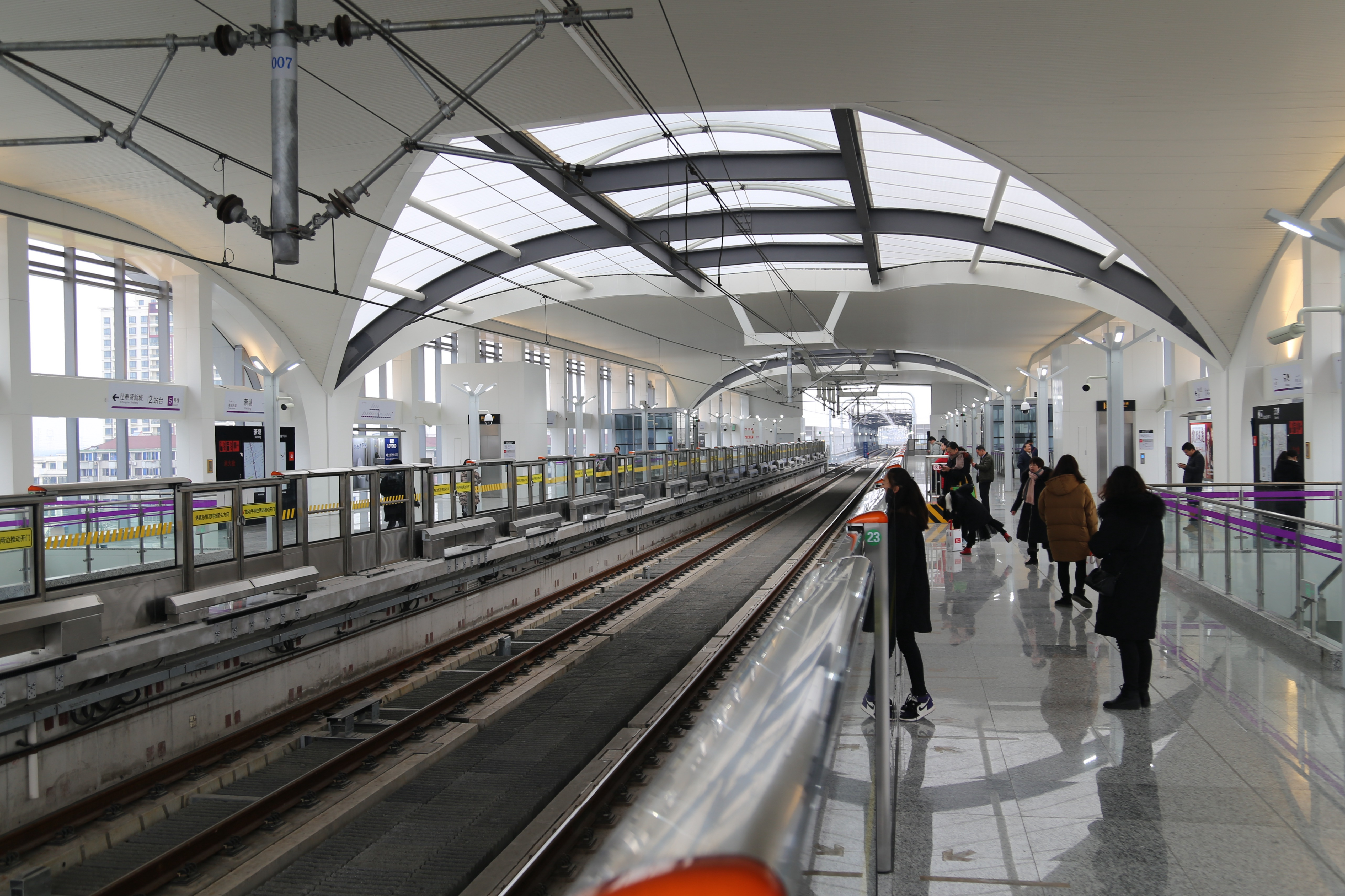 萧塘站站台